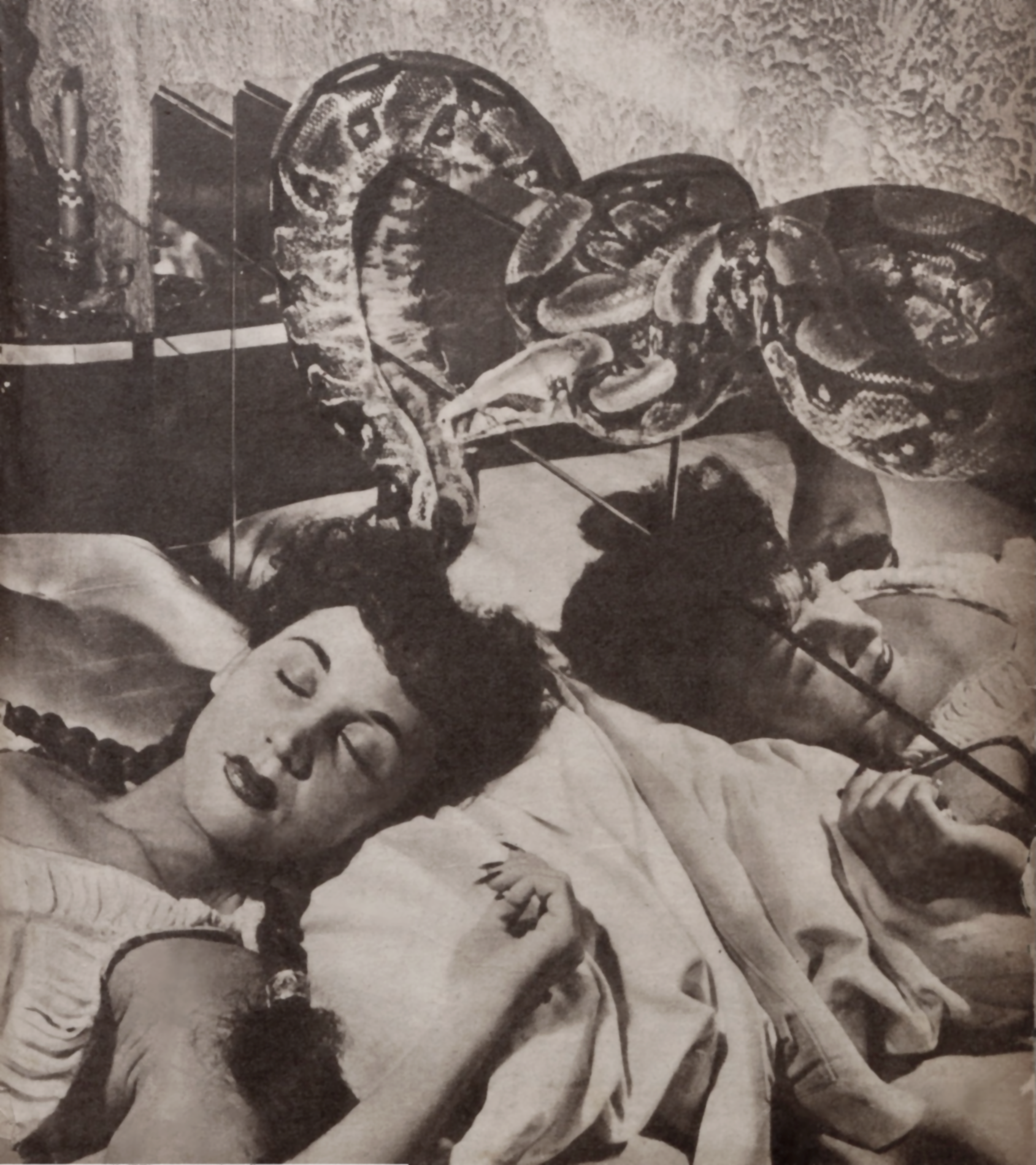 A vedete brasileira Luz del Fuego em 1945, fotografada com uma cobra em 1945 por Jean Manzon, da revista O Cruzeiro.